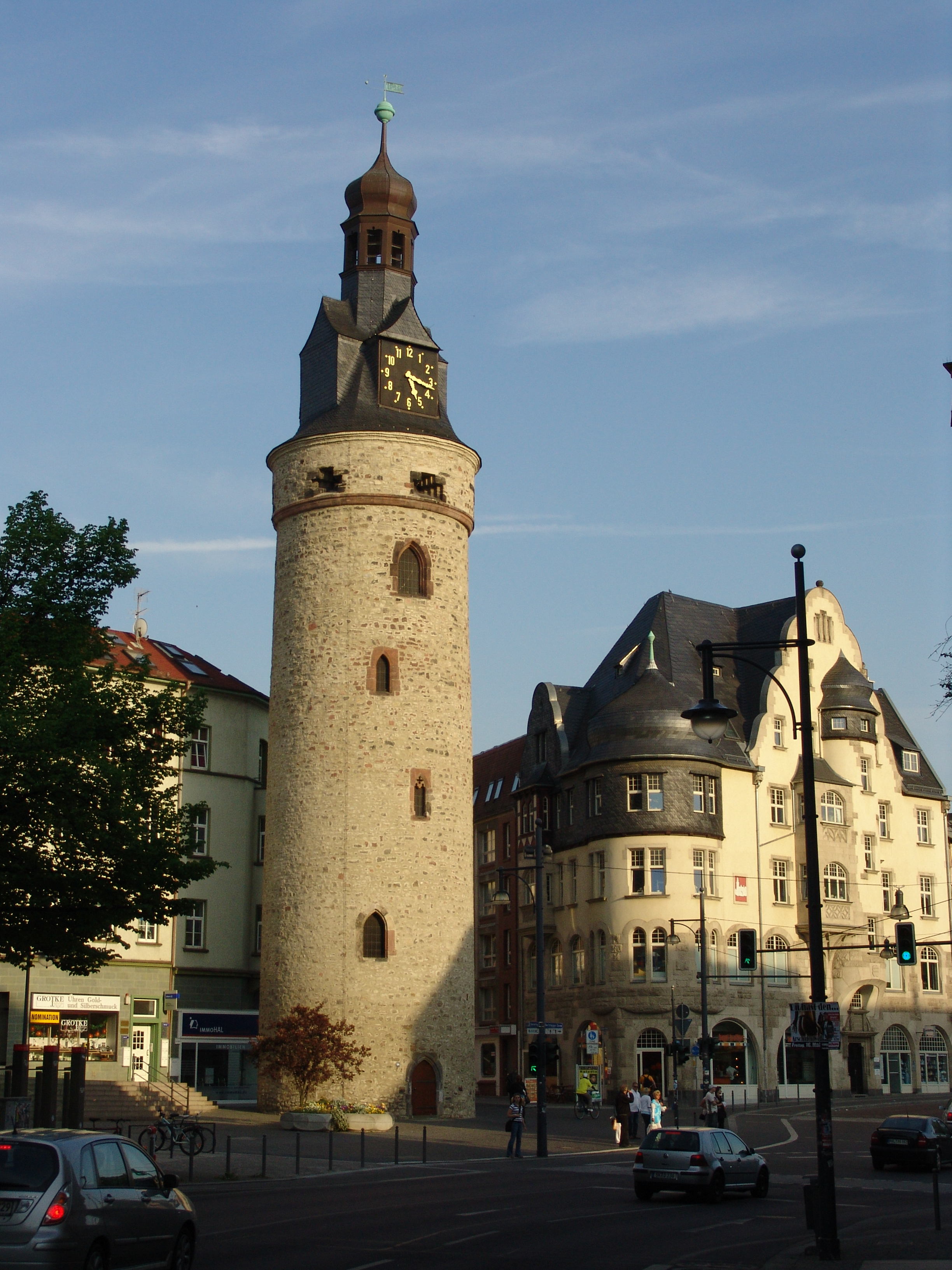 Leipziger Turm in Halle